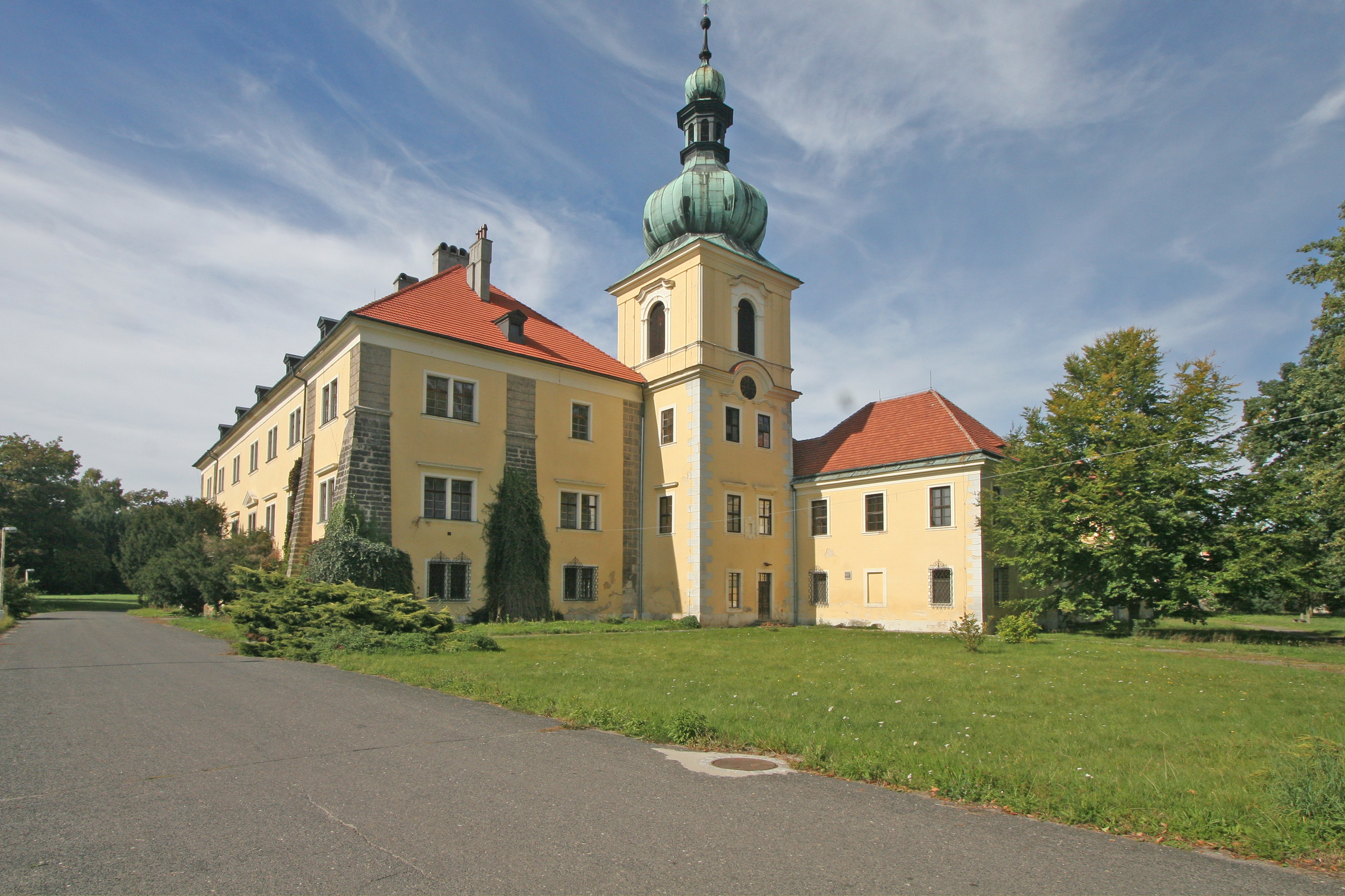 zámek (Doksy), Doksy 183